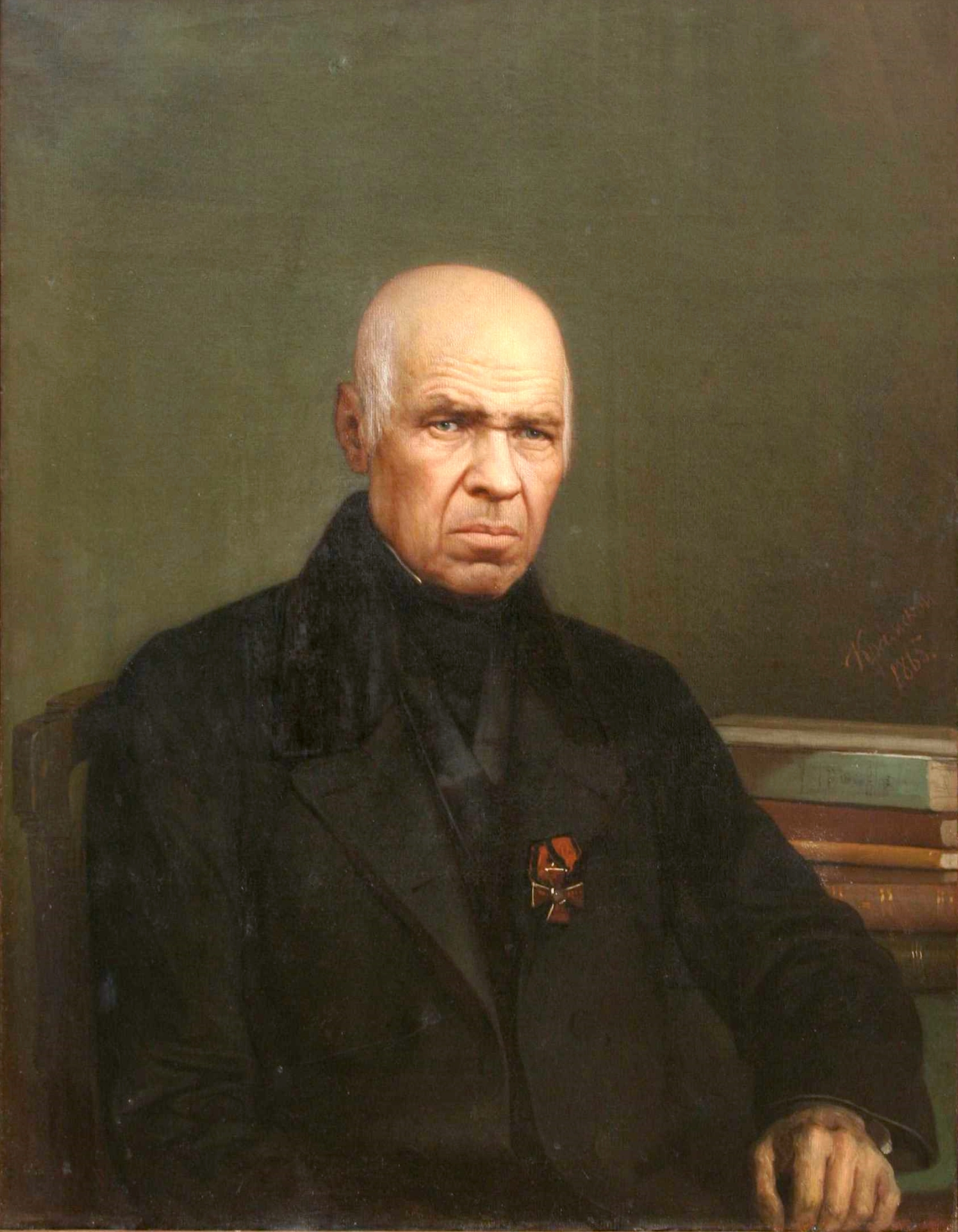 Иван Алексеевич Второв (1772—1844) — русский просветитель